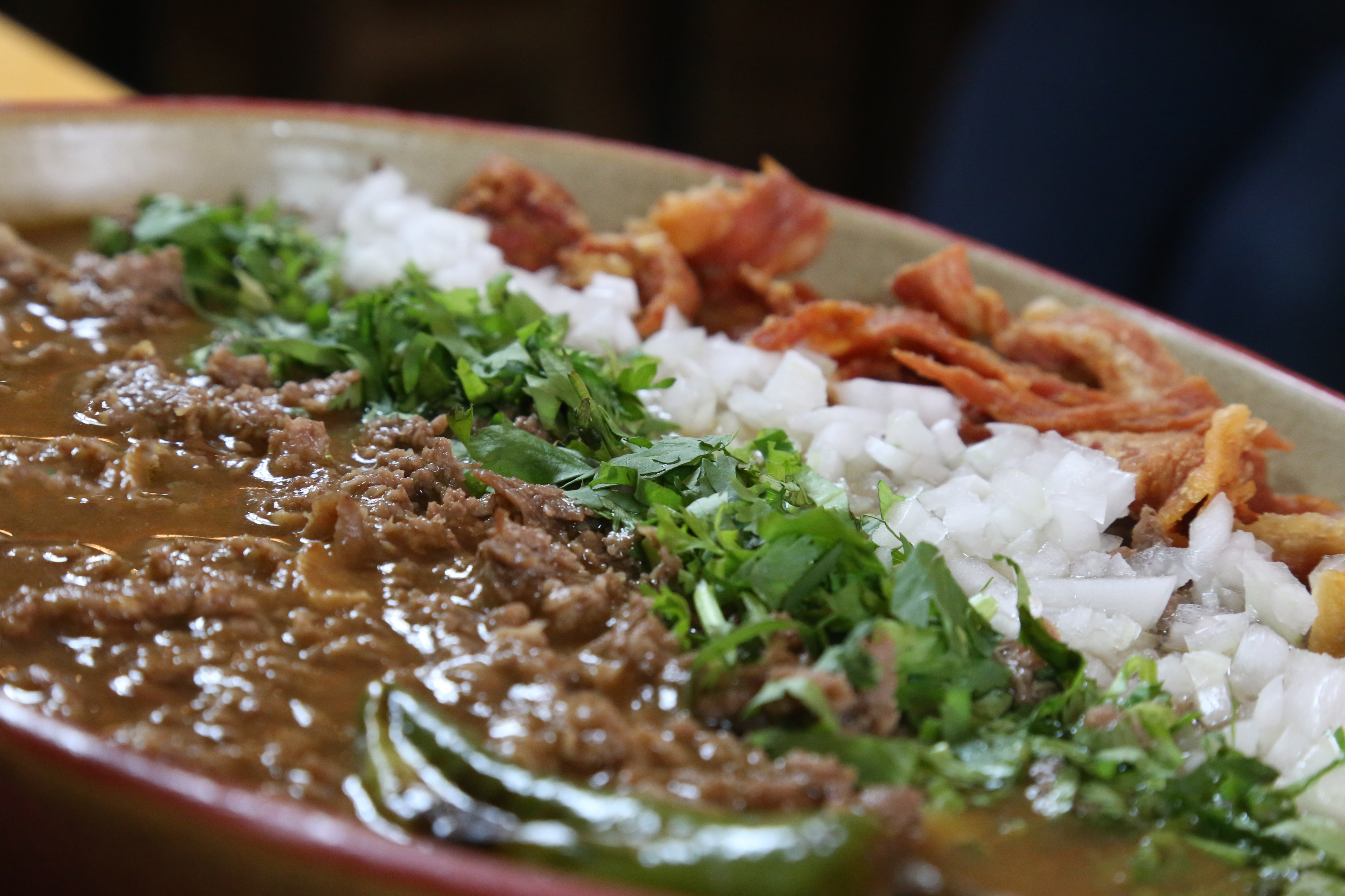 Este es un plato con carne en su jugo. Preparado con tocino, cebolla y cilantro.